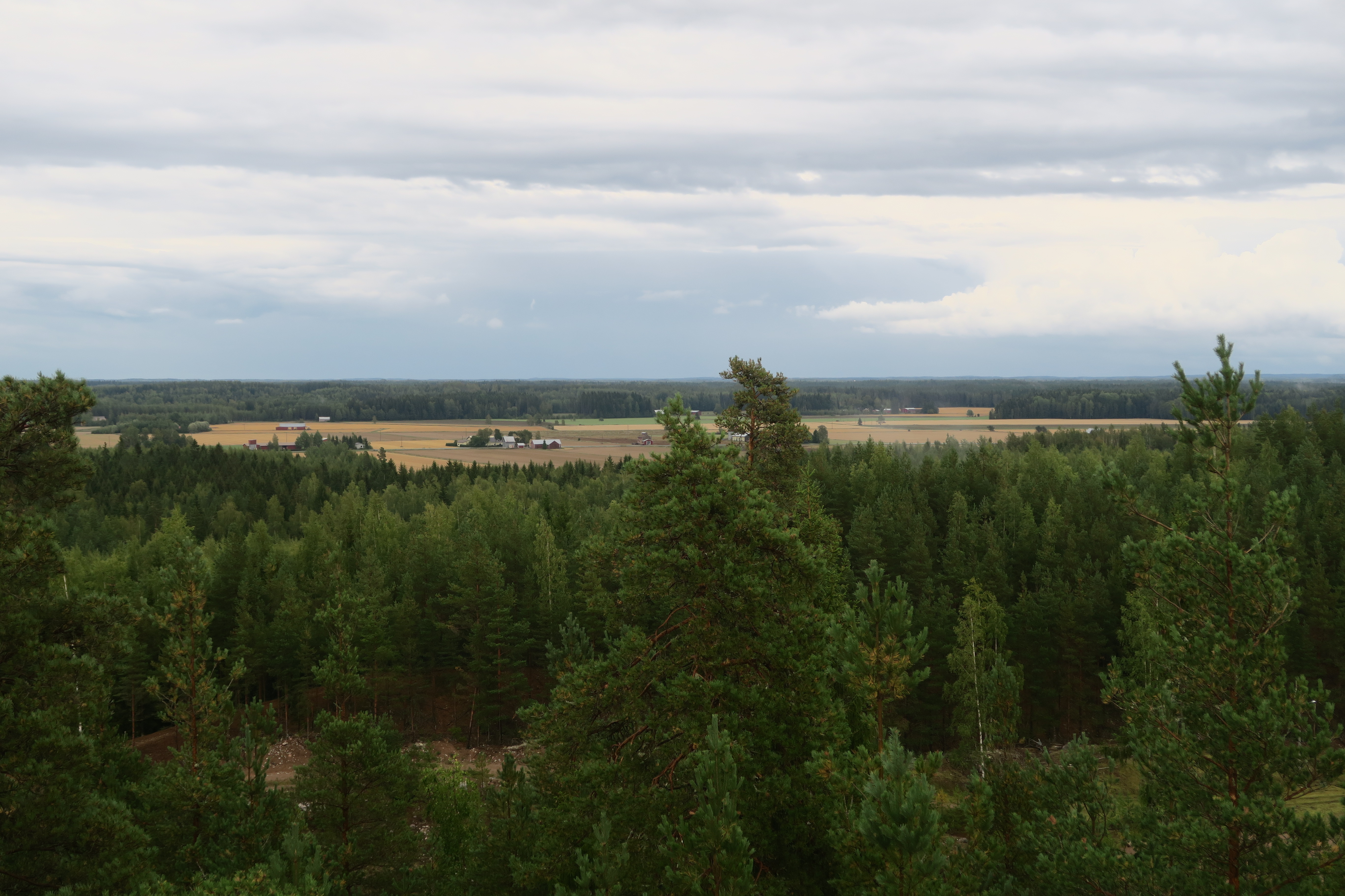 Hevonlinnan harju Tl Koskella, näkymä näkötornista Mellilän suuntaan